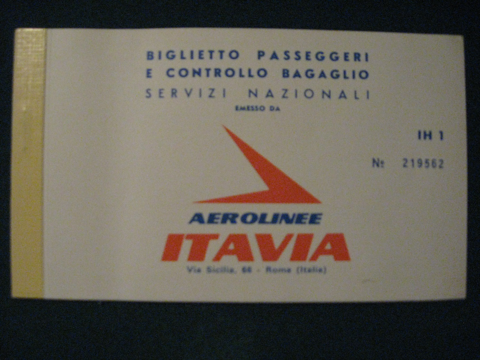 Biglietto Milano-Bologna delle aerolinee Itavia